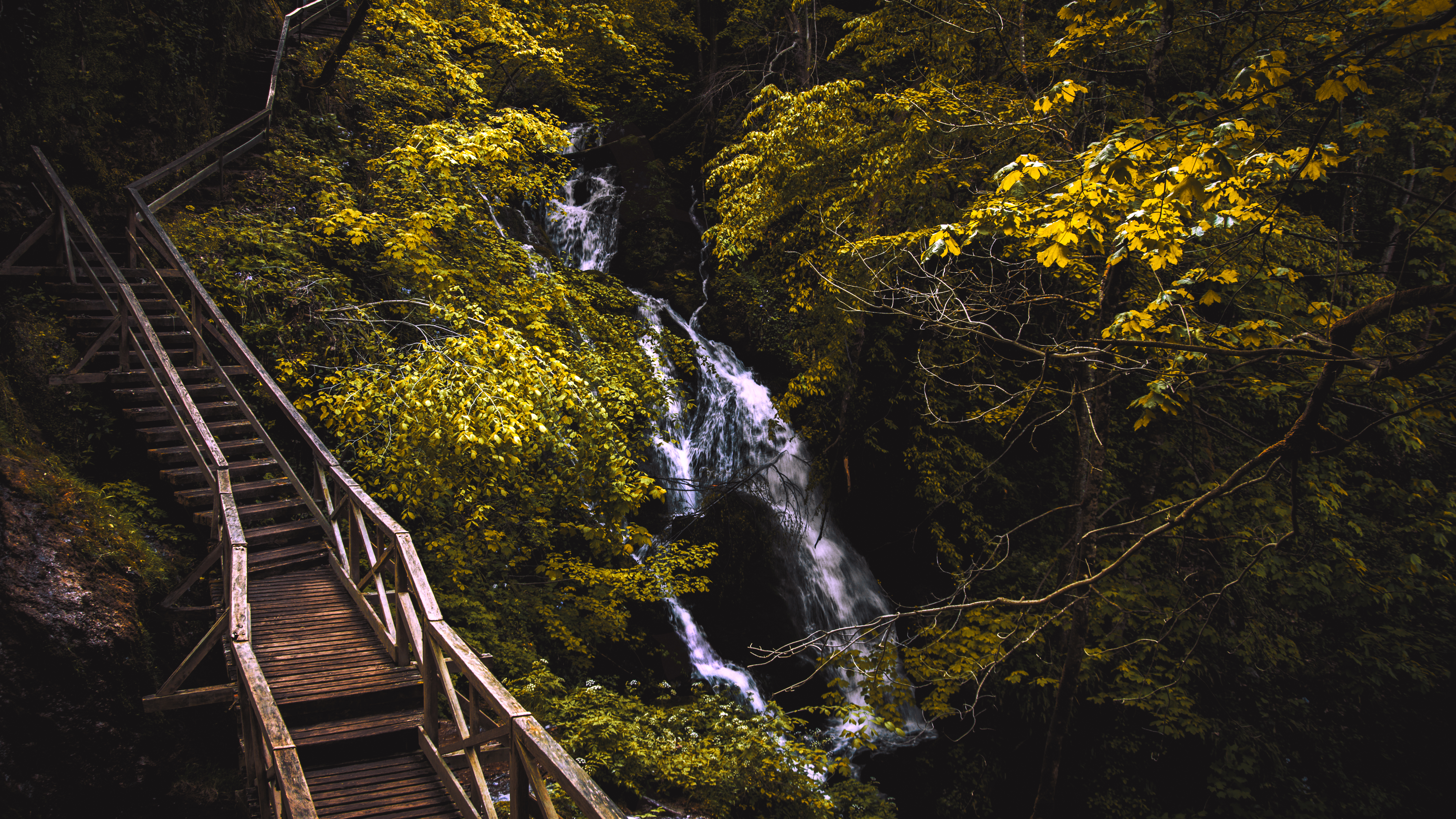 Izletište Jankovac na sjevernoj padini Papuka u blizini Podravske Slatine.This is a a photo of a natural area in Croatia with ID: PF06